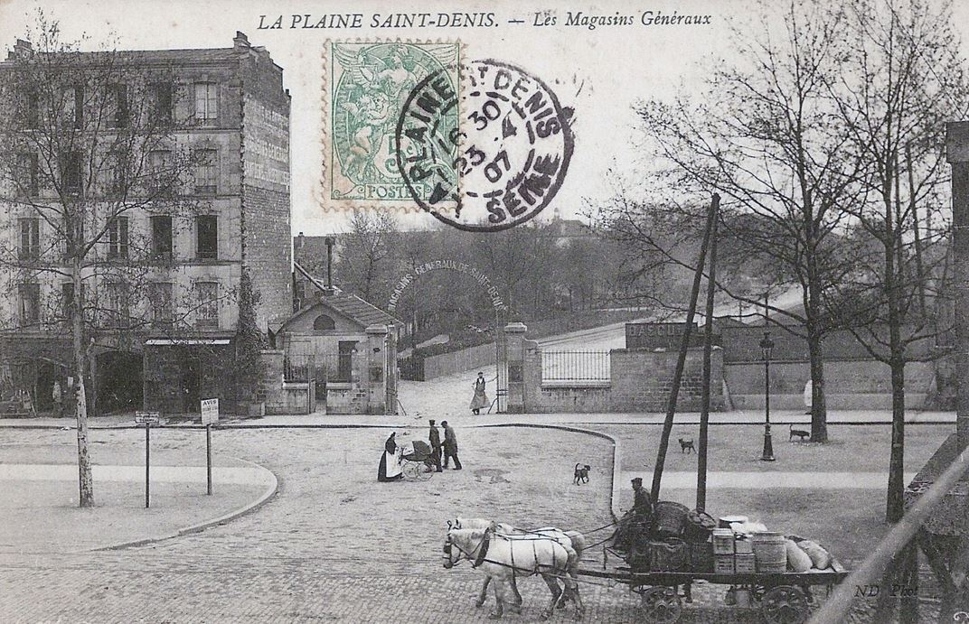 Plaine Saint-Denis, Magasins Généraux